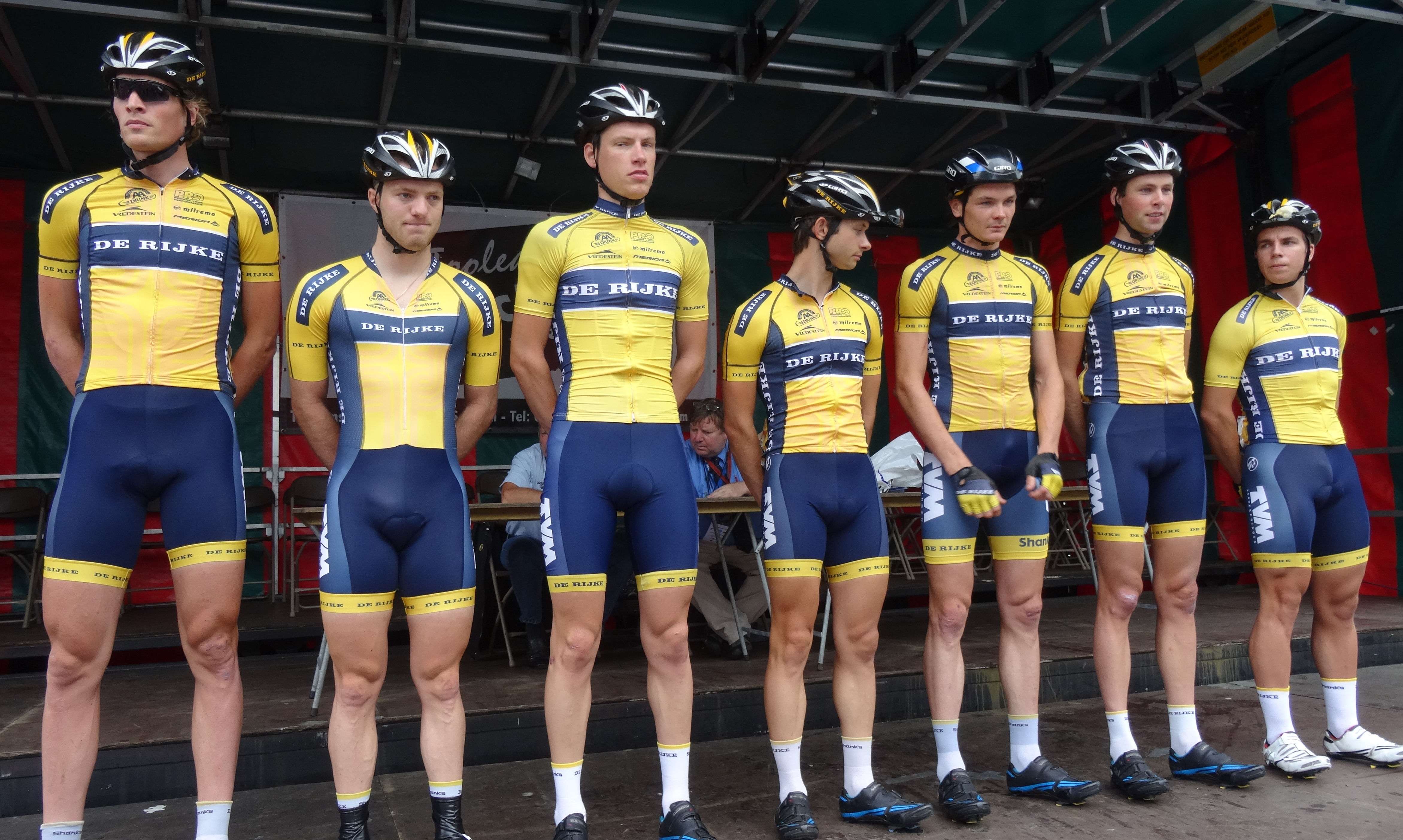 Reportage photographique réalisé le dimanche 10 août à l'occasion du départ et de l'arrivée de la Flèche du port d'Anvers 2014 à Merksem (Anvers), Belgique.